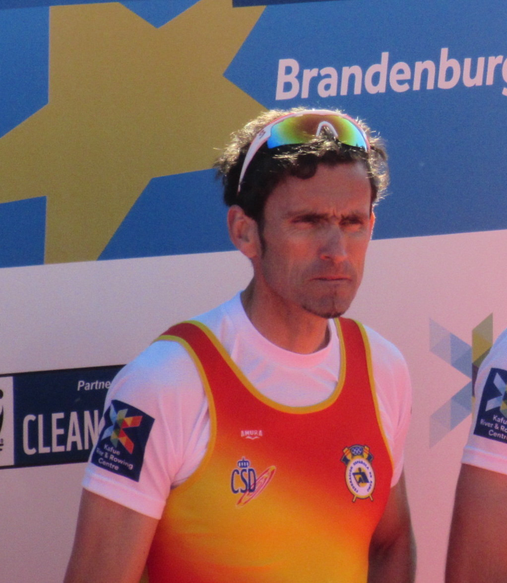 Picture of Jesús González Álvarez